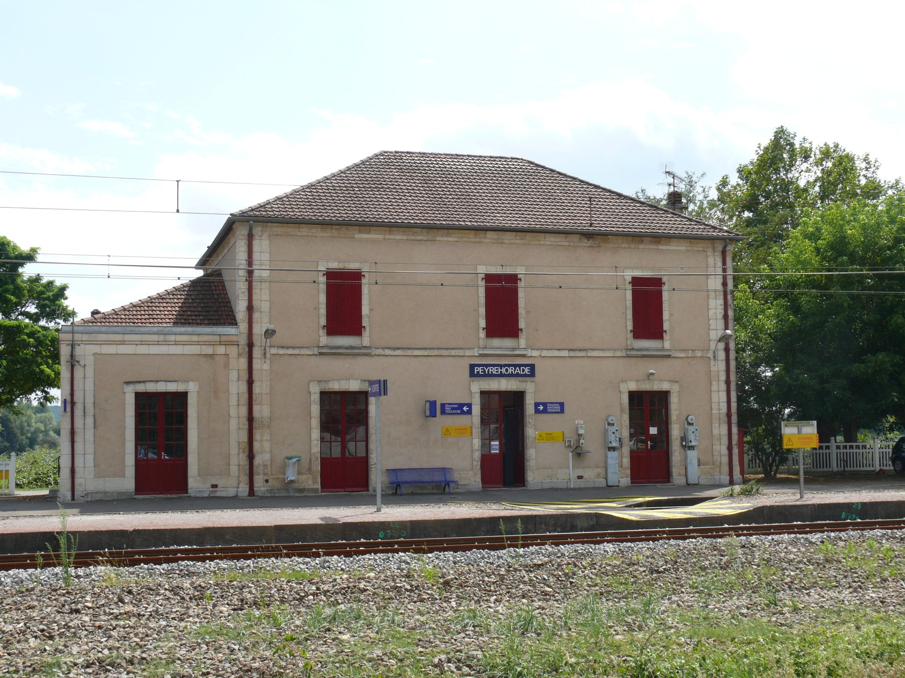 Peyrehorade train station (Landes, Aquitaine, France).